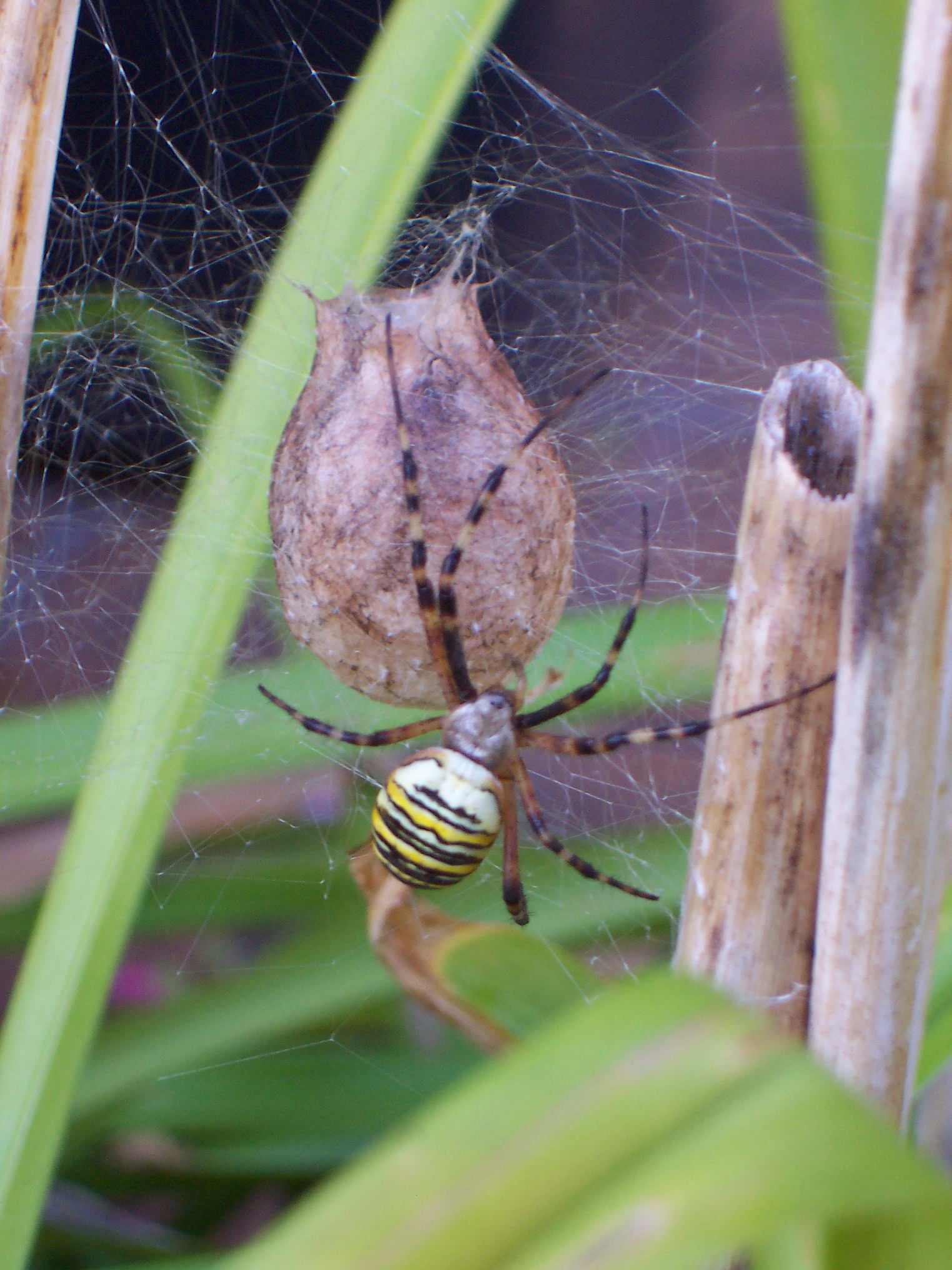 Argiope bruennichi with egg sac - Wespenspinne mit Kokon